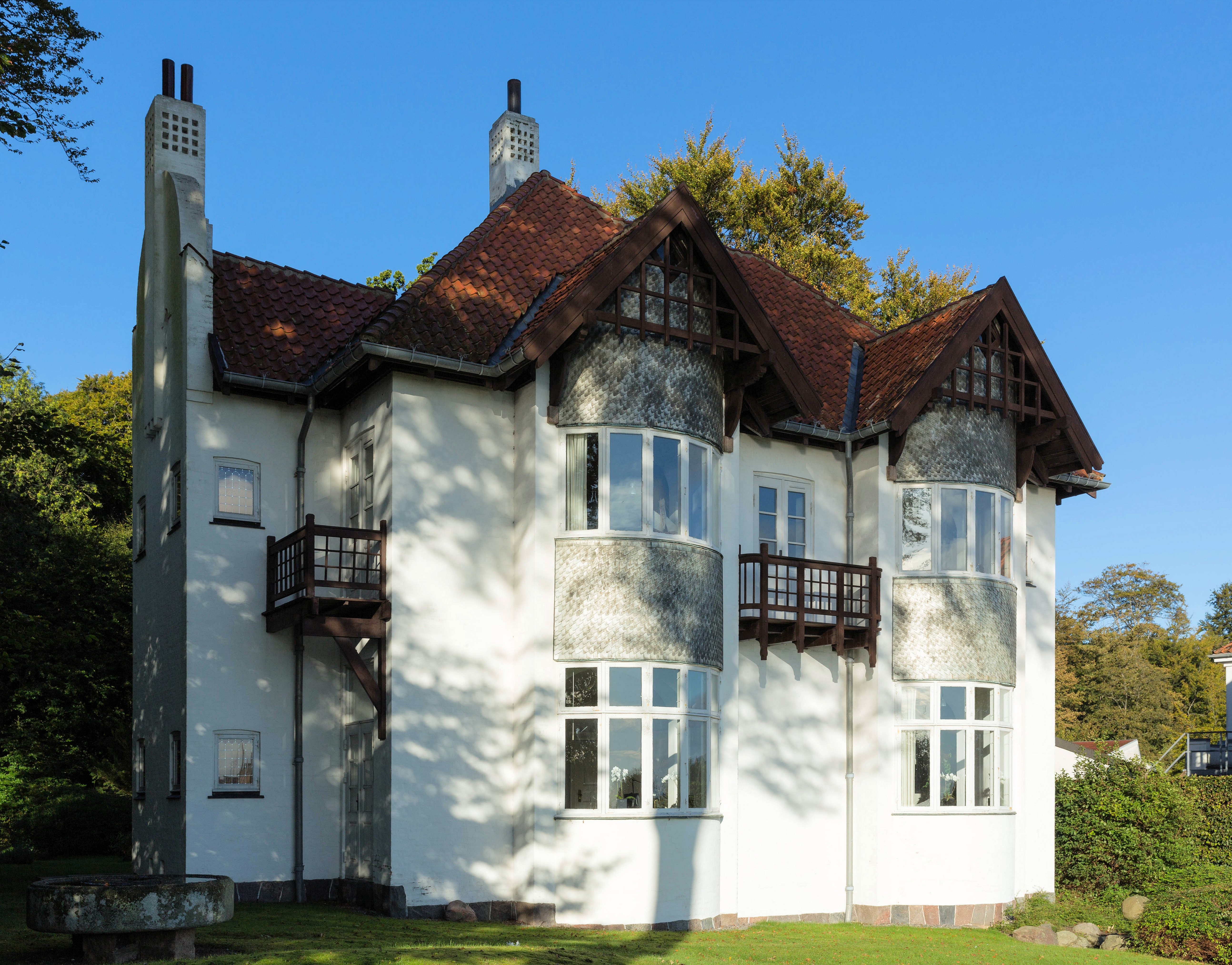 Villa Kampen skrå forfra